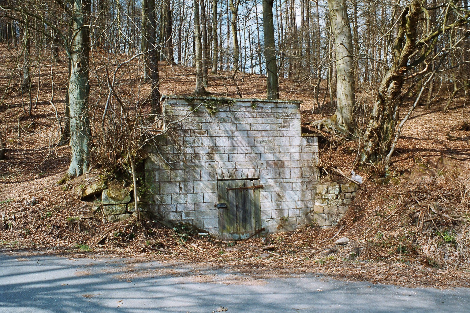 Einhardshagen: Felsenkeller, ehem. Bierlagerstollen Quelle: selbst fotografiert Fotograf/Zeichner: presse03 Datum: 08.04.2006